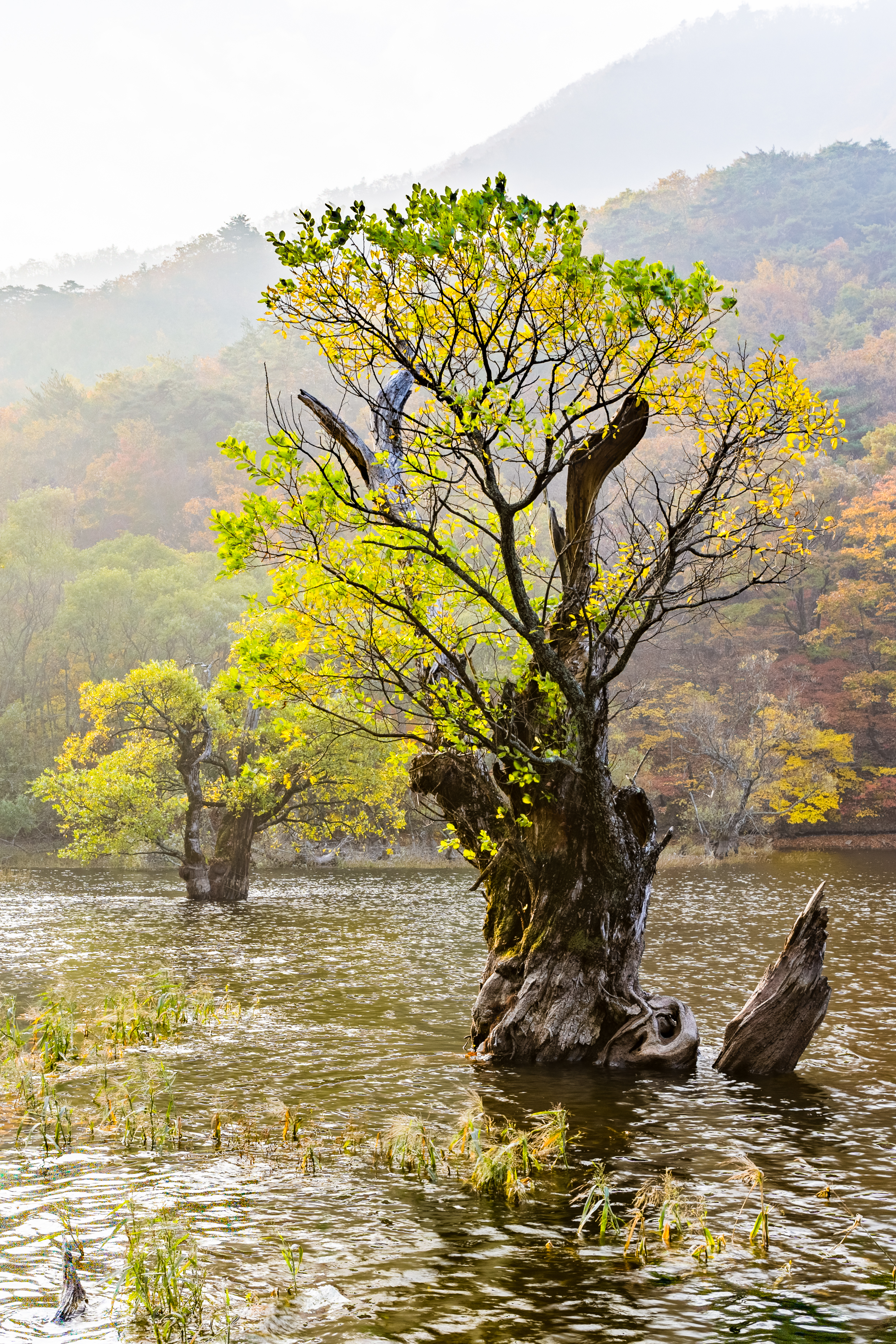 대한민국 경상북도 청송 주산지